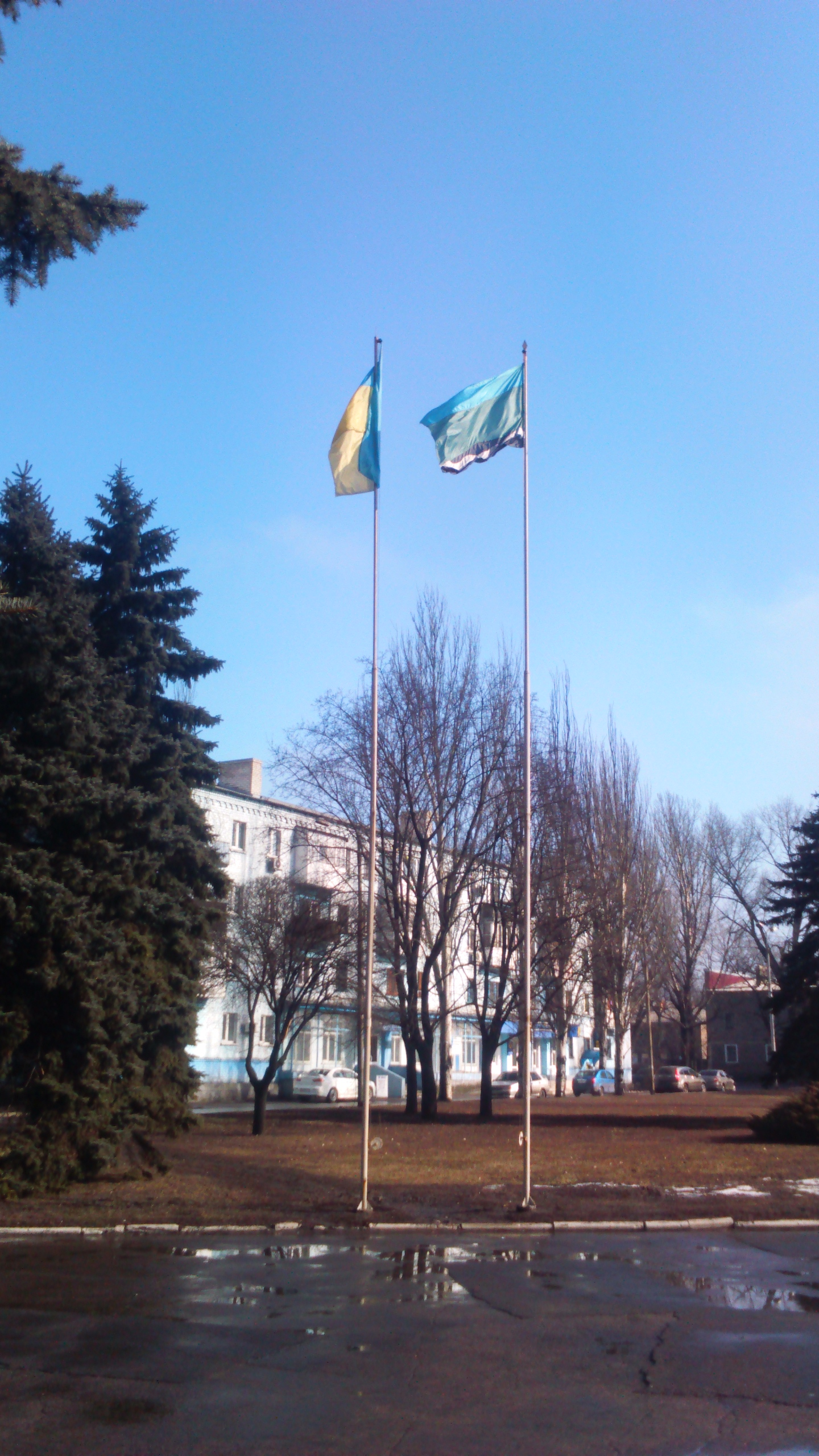 Прапор міста Добропілля в центрі міста.